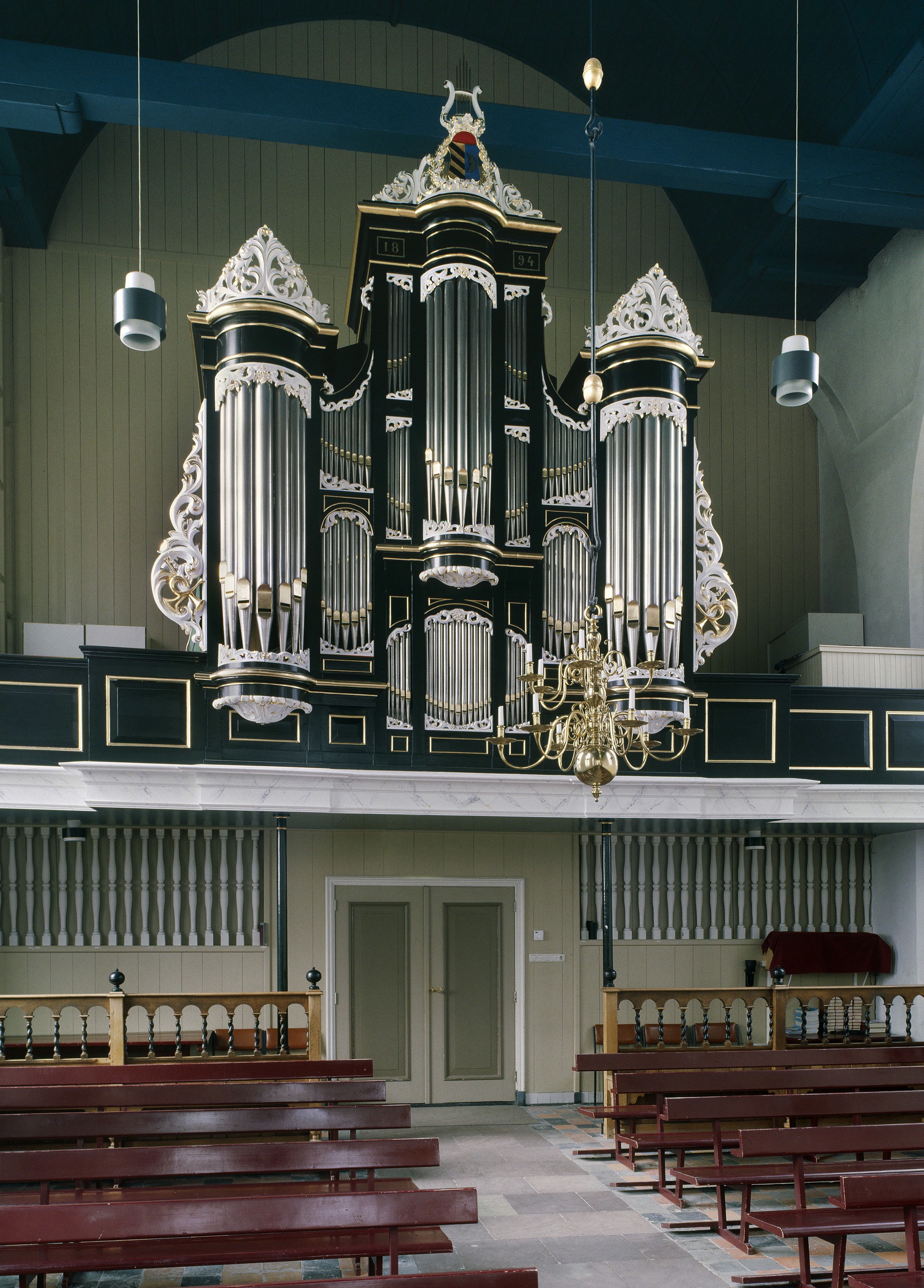 Nederlands Hervormde Kerk: Interieur, aanzicht orgel, orgelnummer 698 (opmerking: Gefotografeerd voor Het Historische Orgel in Nederland 1886-1894, bladzijde 346)